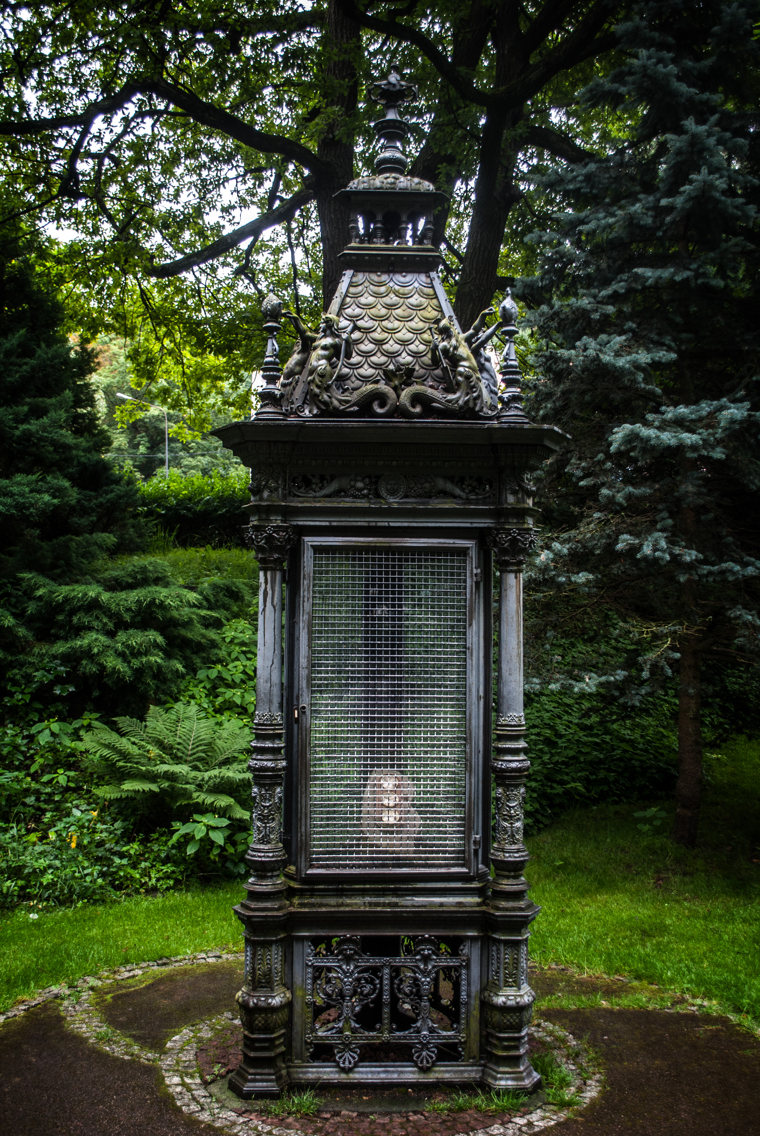 Duszniki-Zdrój, park zdrojowy, pocz. XIX, 2 poł. XIX